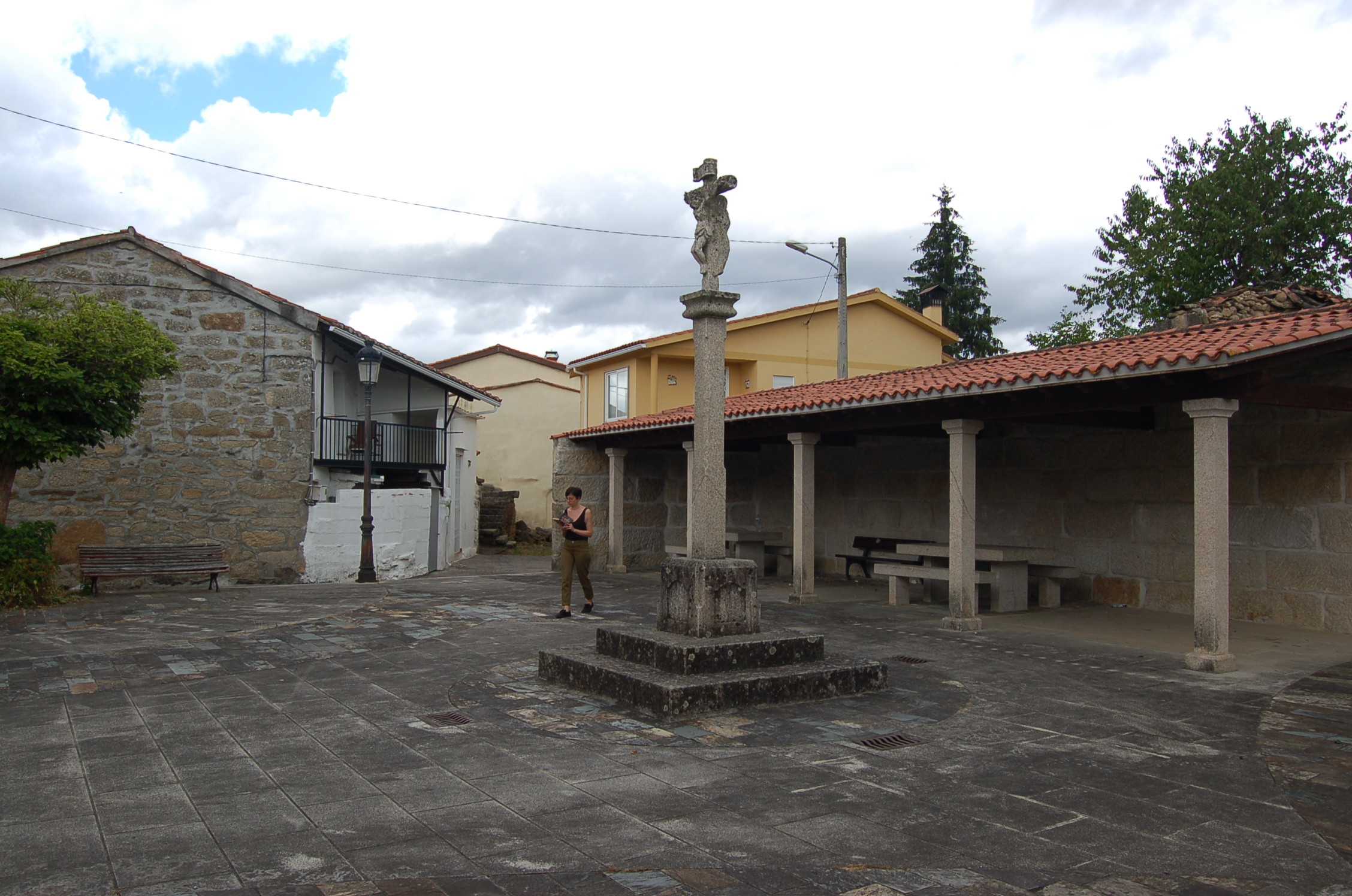 Praza da Igrexa de Tintores, Verín